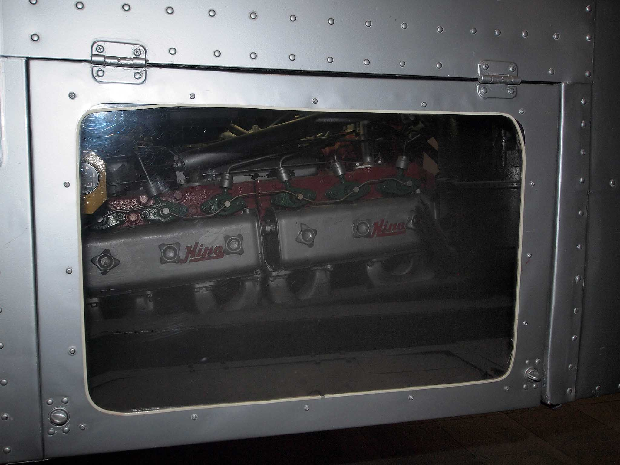 日野RB10に搭載されたDS80型水平直列エンジン。 展示のためエンジンカバーの一部を切り抜き 東急電車とバスの博物館収蔵